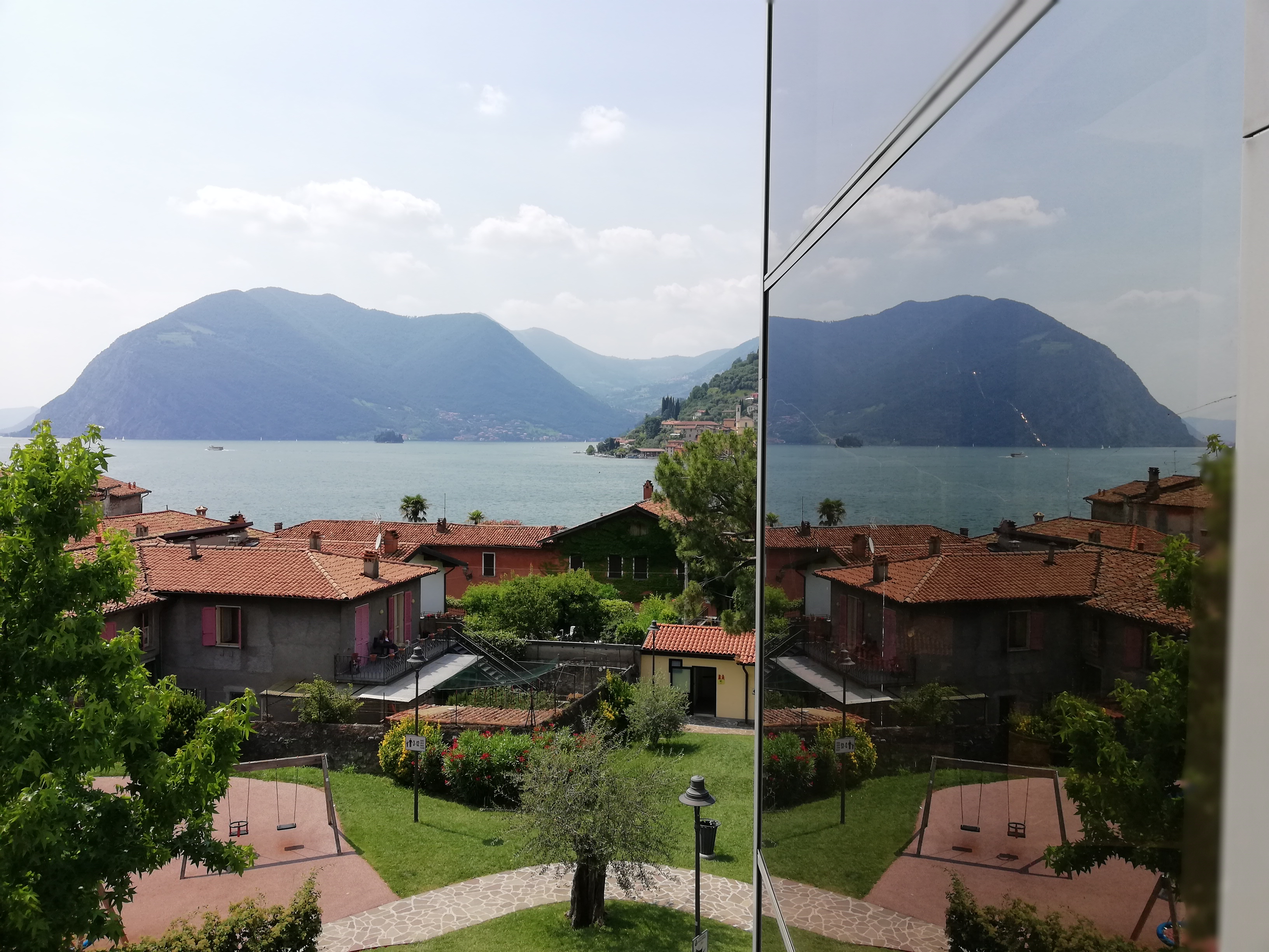 Scorcio dal municipio